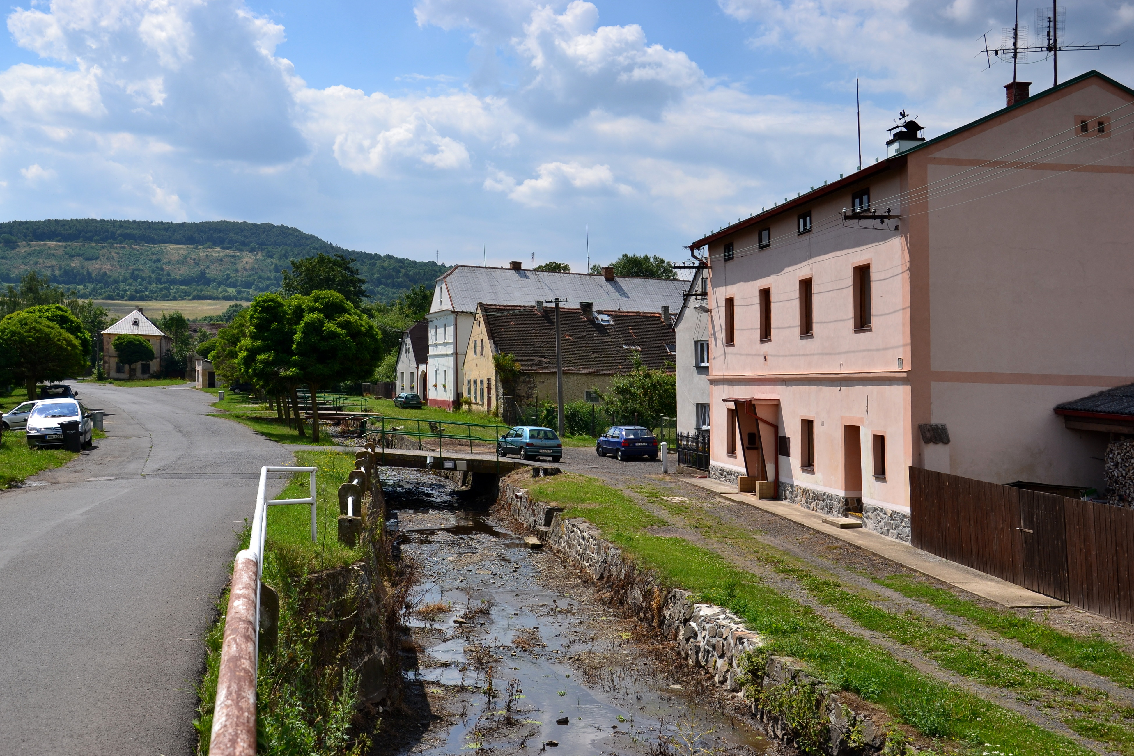 Úhošťany - západní strana podél Úhošťanského potoka